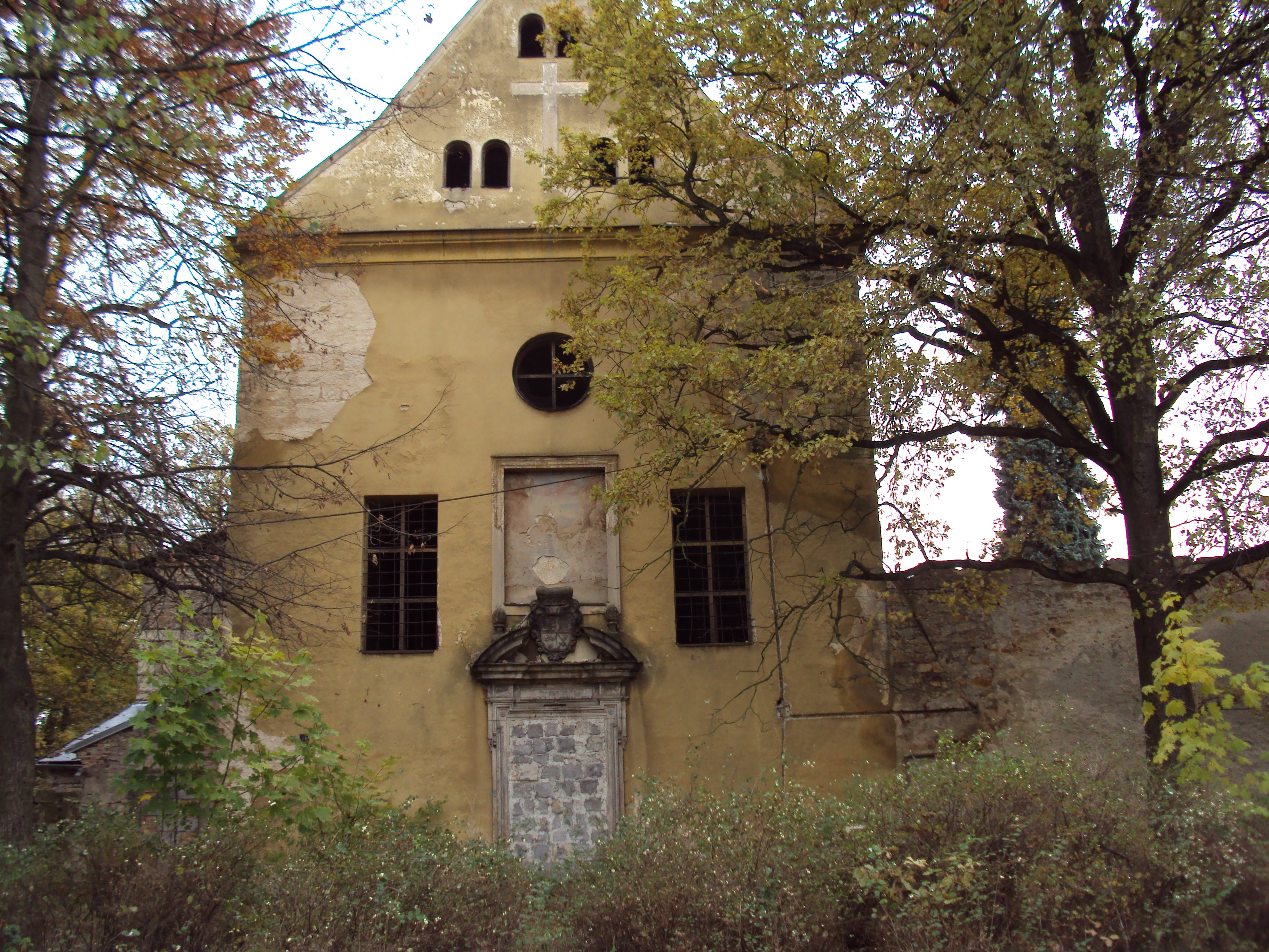 Klášter kapucínů v Zákupech, nám. Míru, dnes ruina